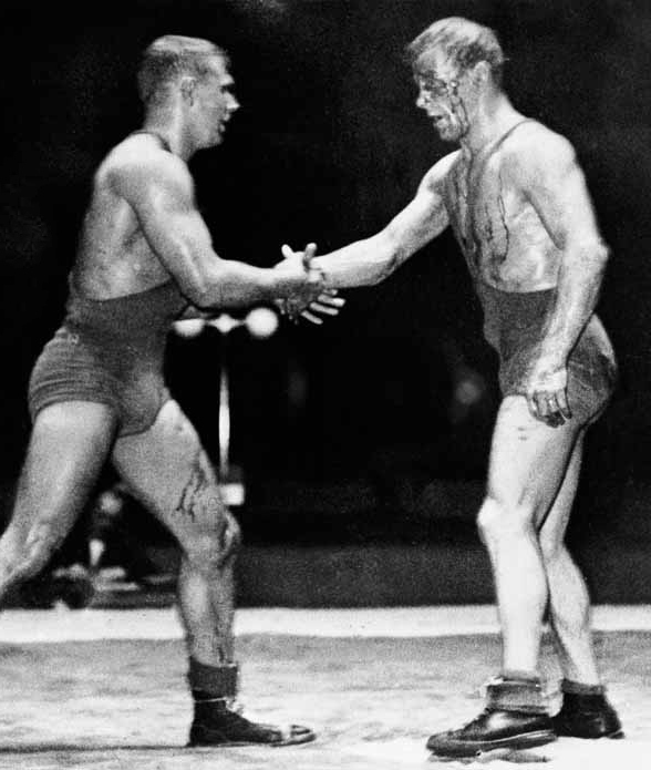 Miklós Szilvási vs Gösta Andersson